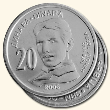 20 serbian dinars.